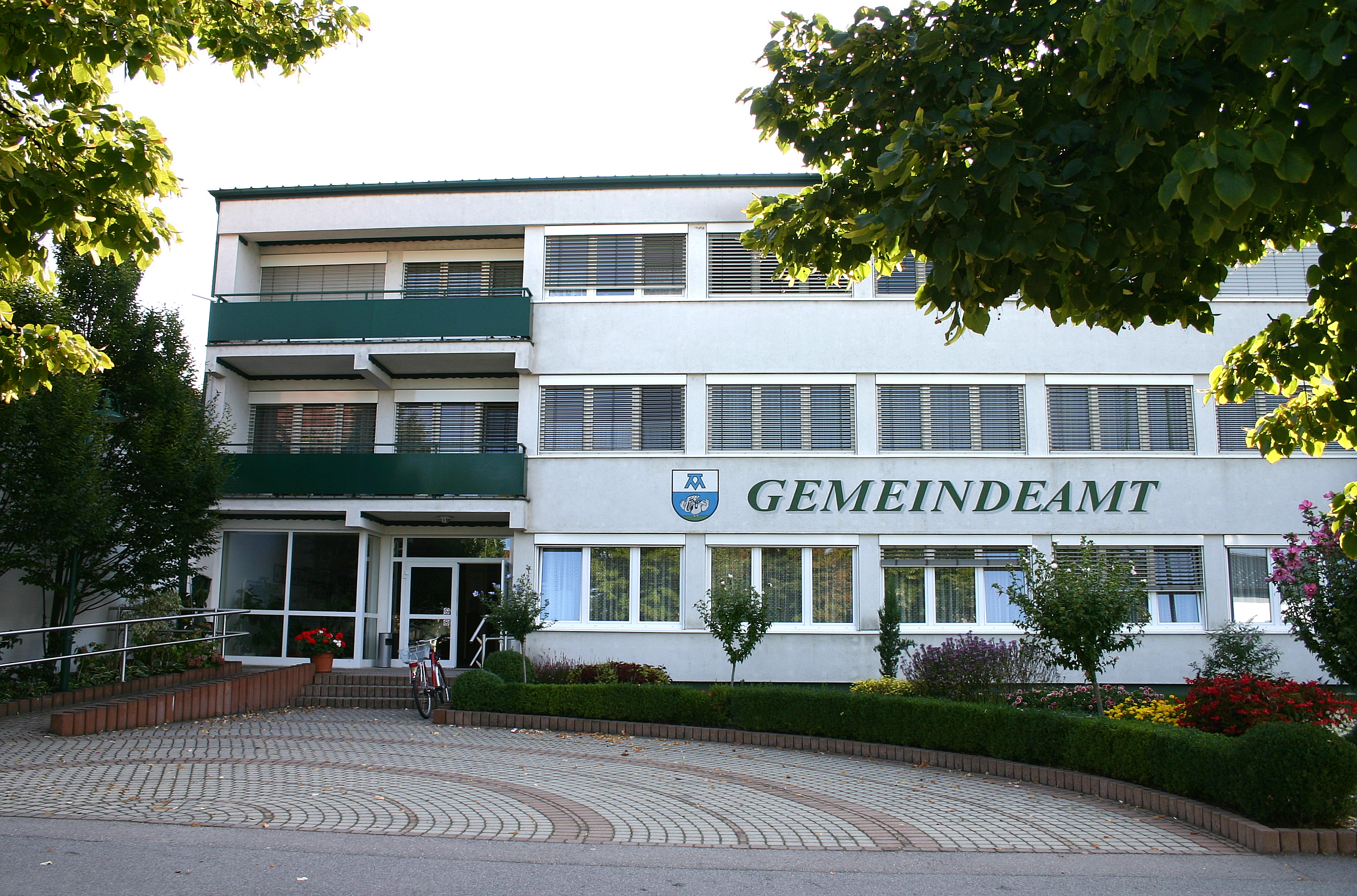 Andau Gemeindeamt